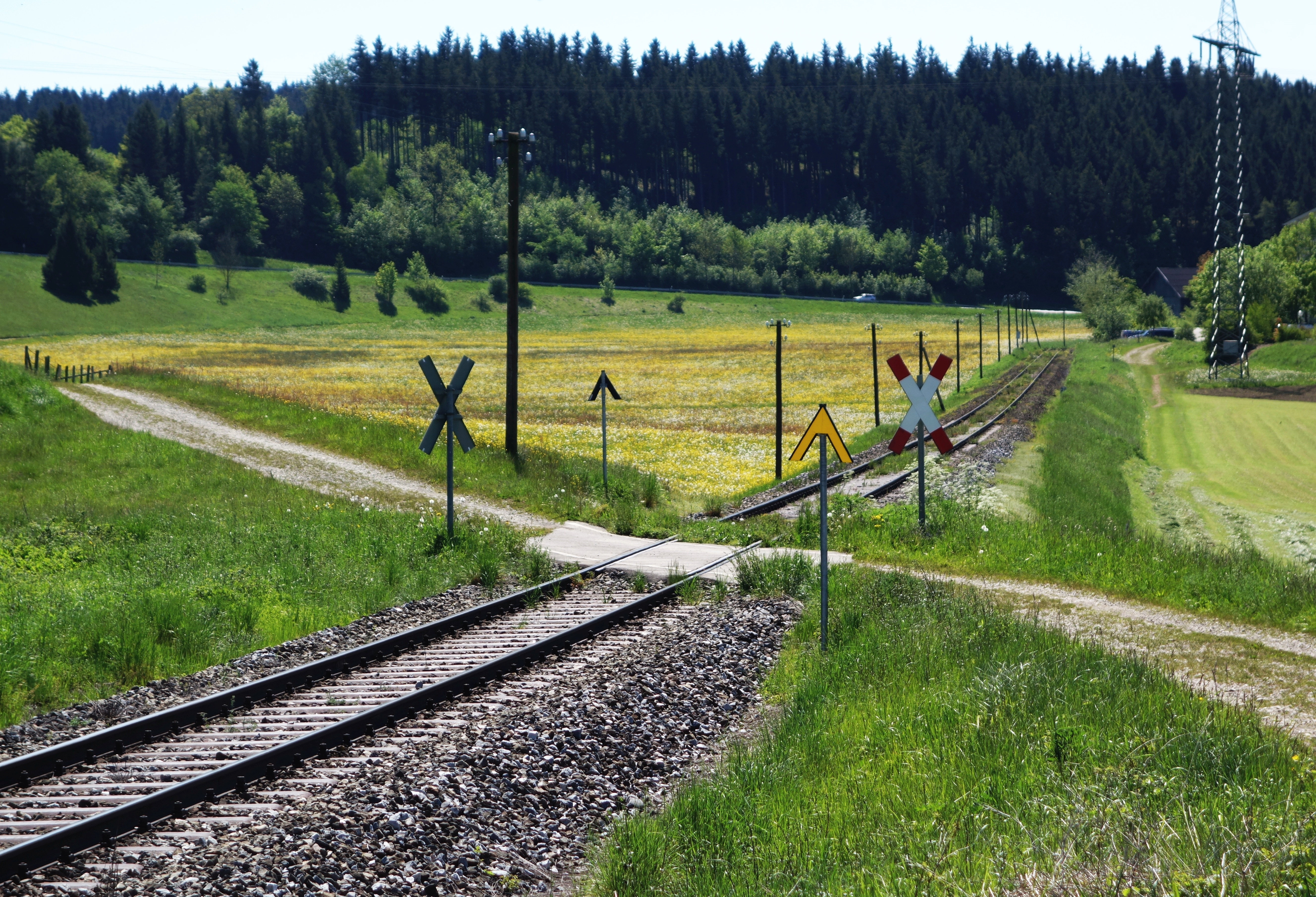 Fuchstalbahn, Kreuzung mit Feldweg nördlich des Schongauer Krankenhauses, nahe km 26,9